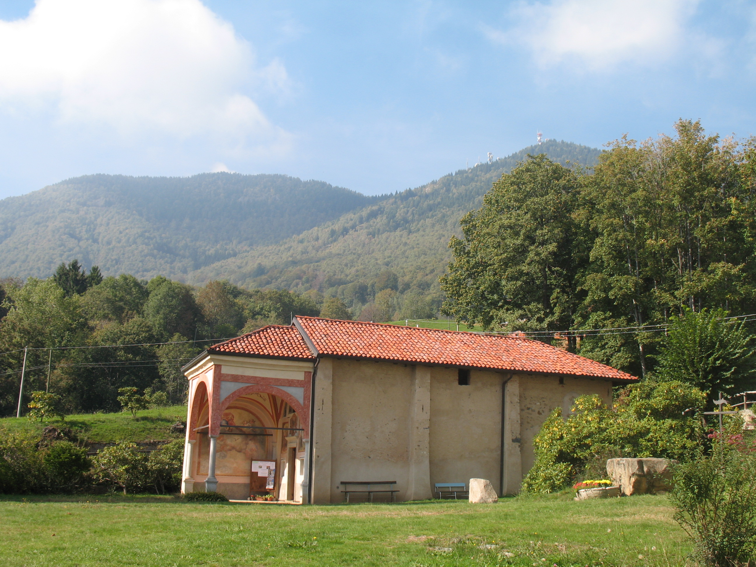 Immagine dal Santuario di Nostra Signora della Brughiera, presso Trivero (provincia di Biella, Piemonte, Italia)